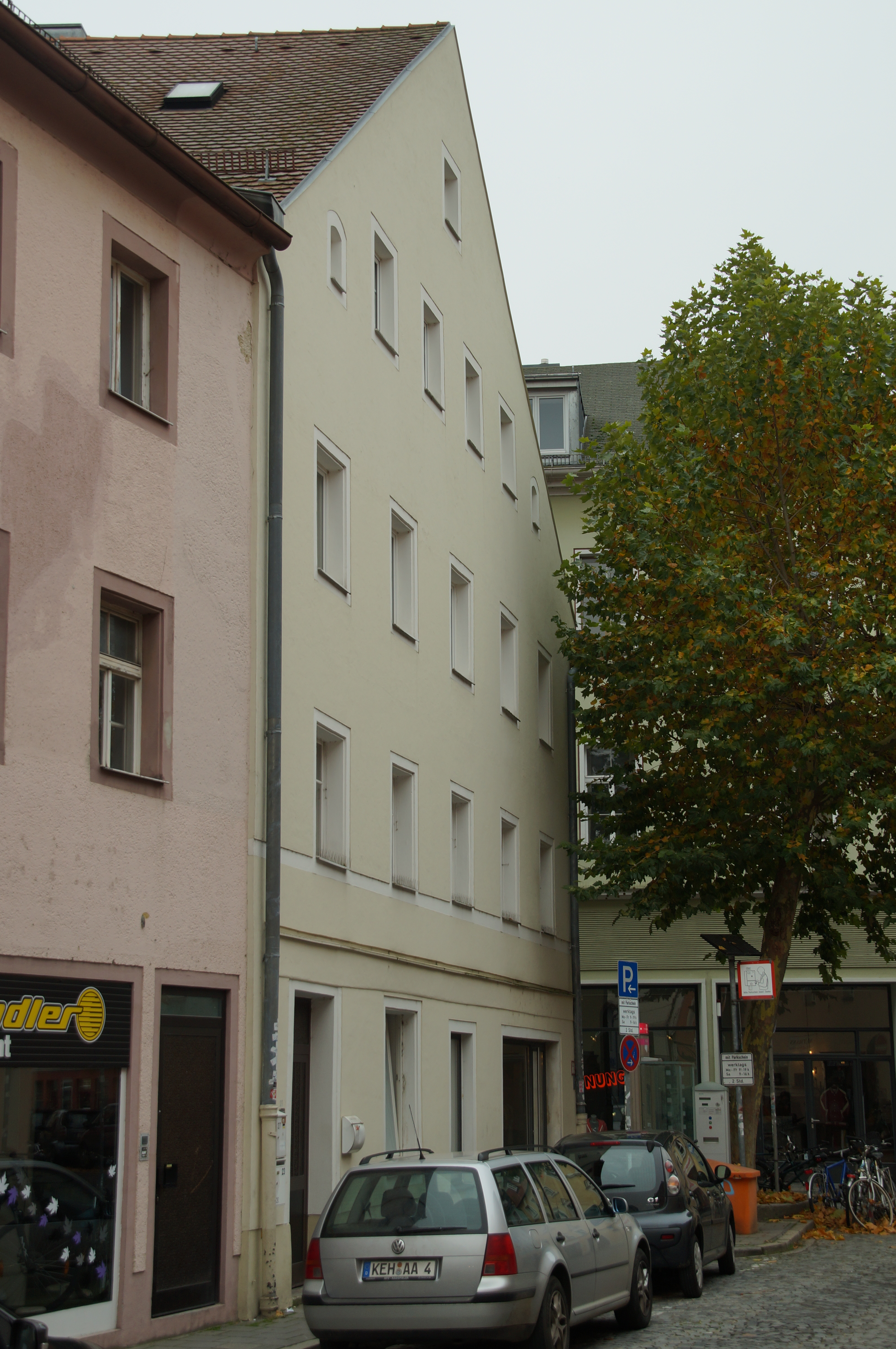 Dreigeschossiges und giebelständiges Satteldachhaus in Ecklage, im Kern wohl 1784, nach Zerstörungen 1809 und 1945 wiederhergestellt. This is a photograph of an architectural monument.